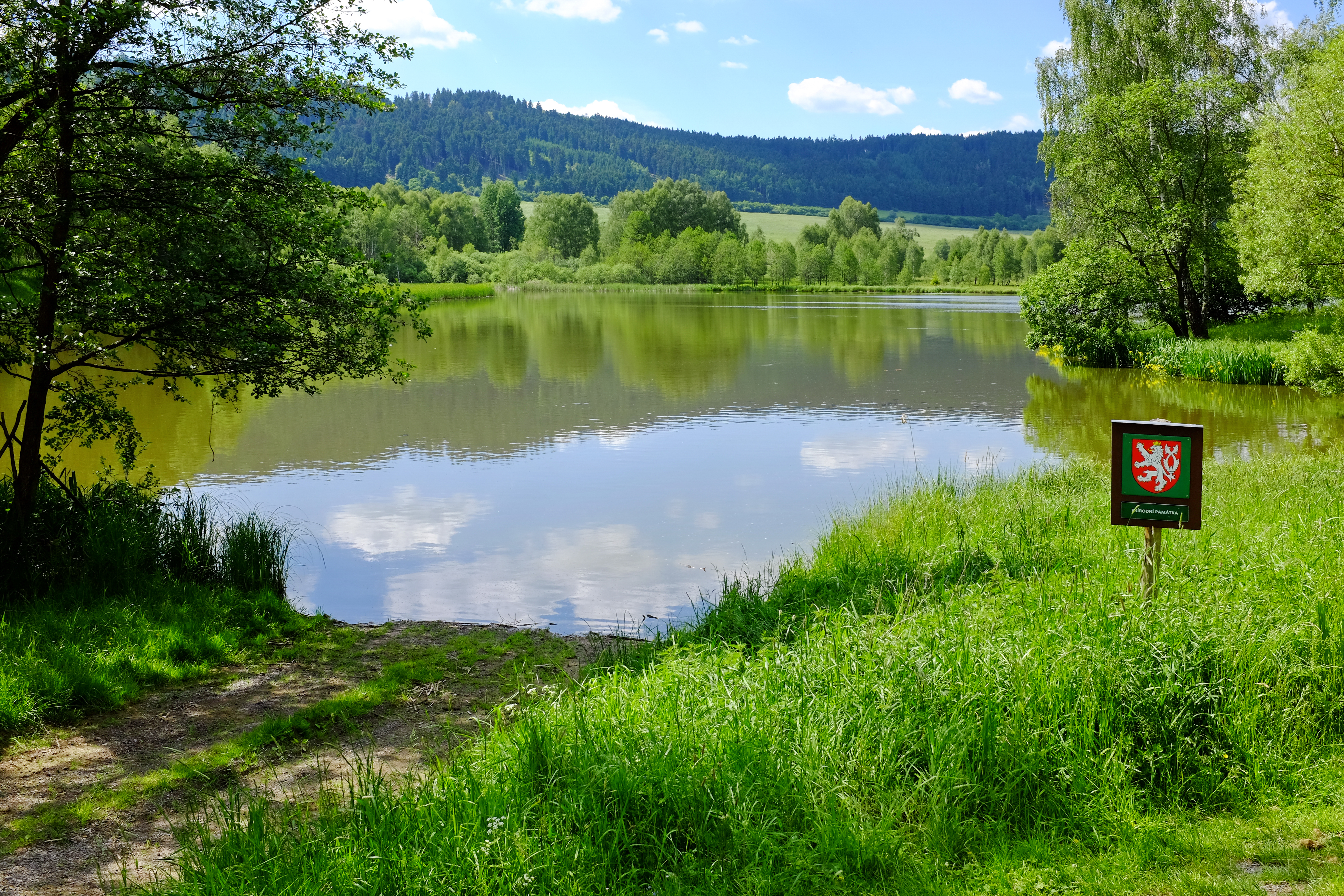 Přírodní památka Blažejský rybník, u obce Branišov, okres Karlovy Vary